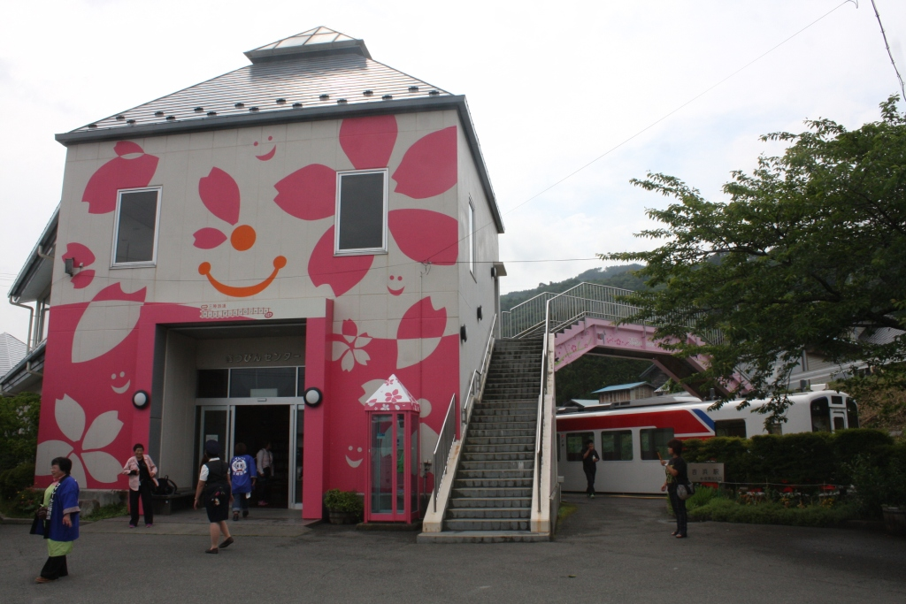 三陸鉄道南リアス線 吉浜駅